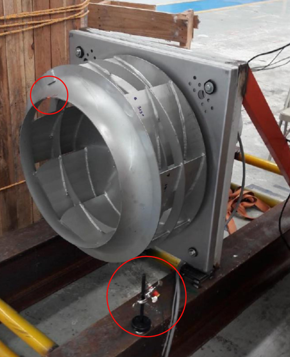 Rotor vorbereitet zum Betriebswuchten mit Reflexstreifen, Laser-Lichtschranke und Winkelmarkierung auf den Blättenr.